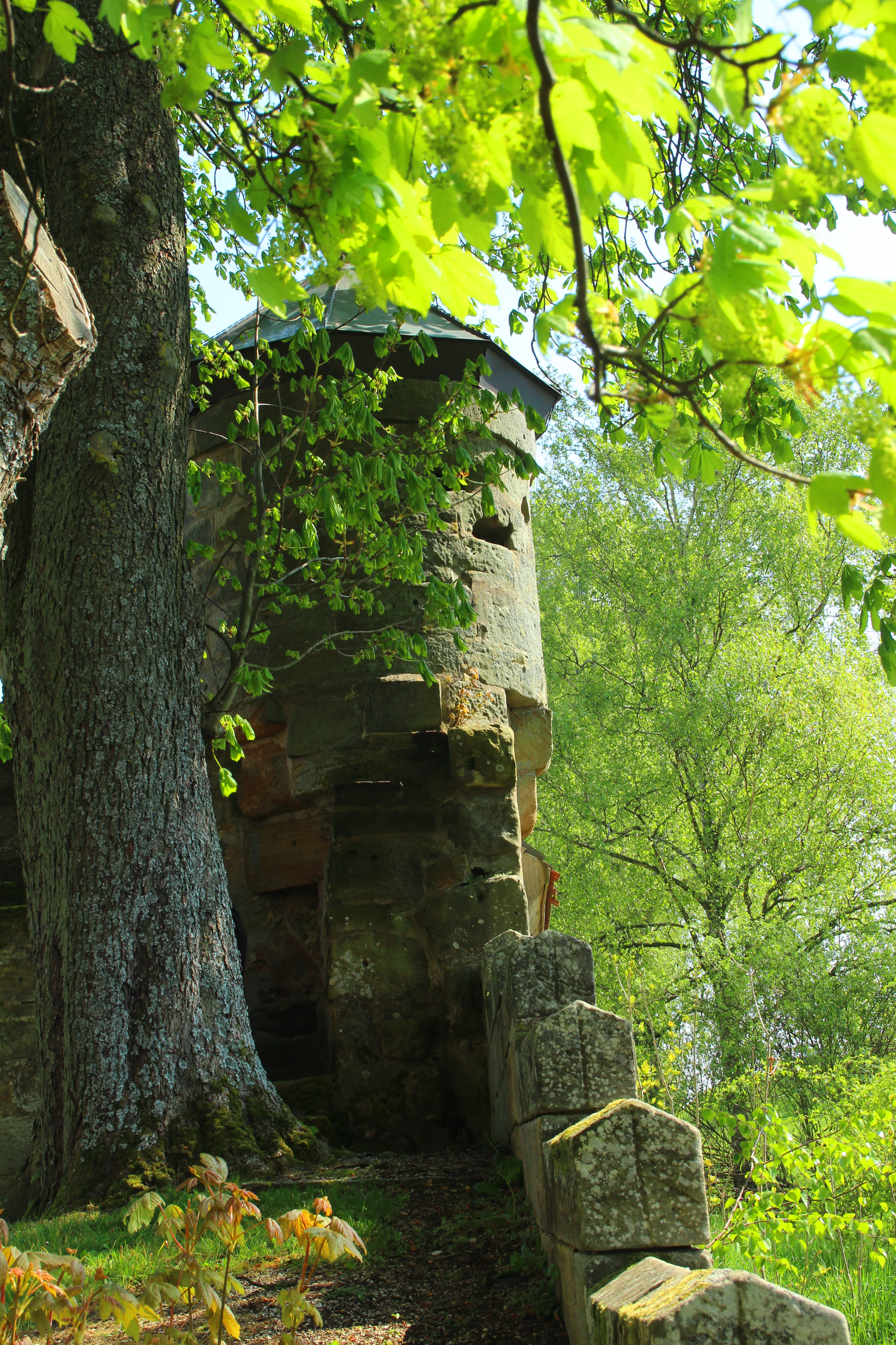 Wehrturm Kirchenburg Gesees